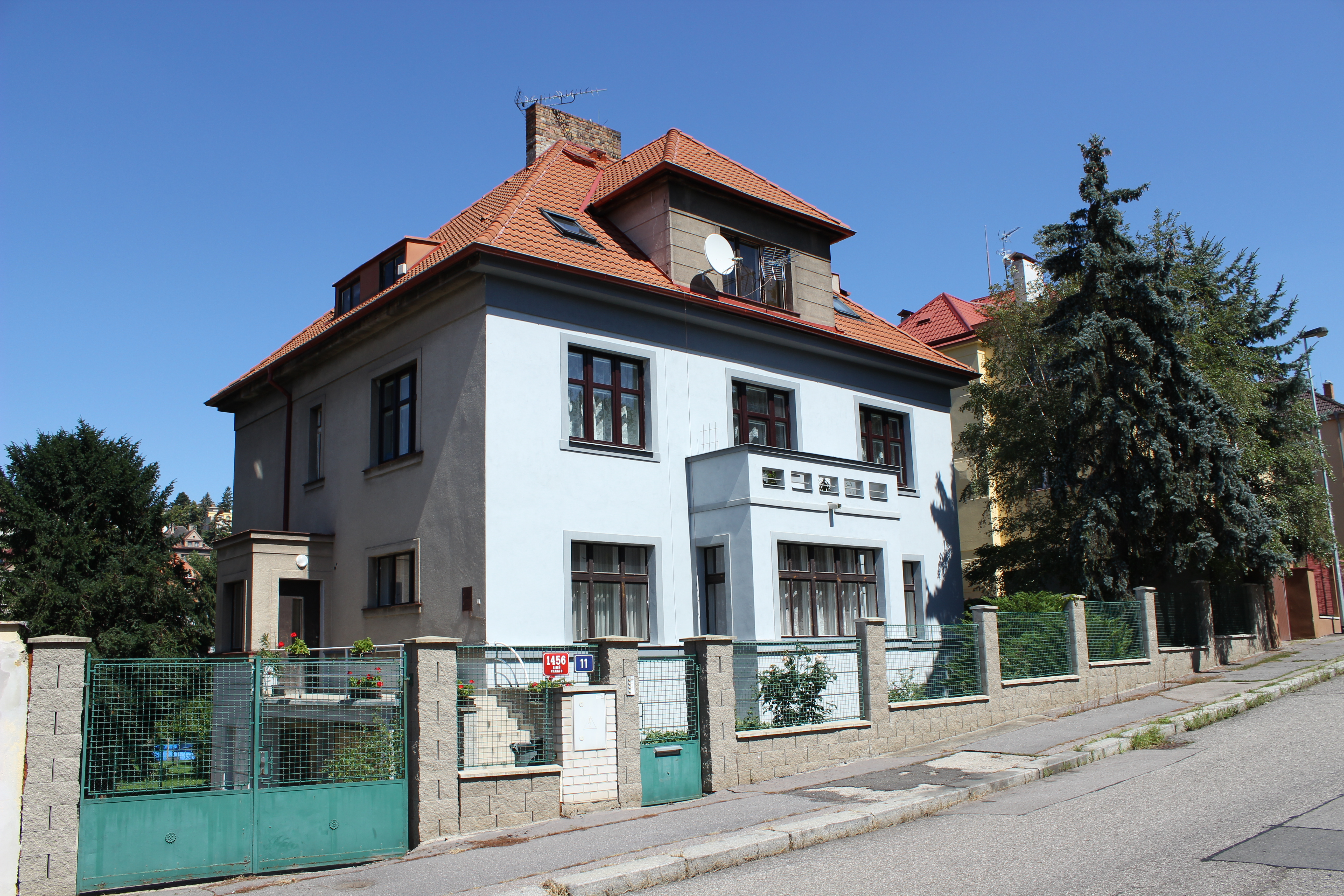 Dům číslo popisné 1456 v pražské ulici Na Truhlářce.